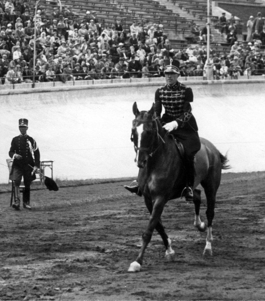 Pahud de Mortanges, Olympisch kampioen paardrijden, op Marquis tijdens het Ruiterfeest te Amsterdam, 1934.